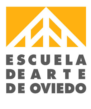 logo de la escuela de arte de oviedo